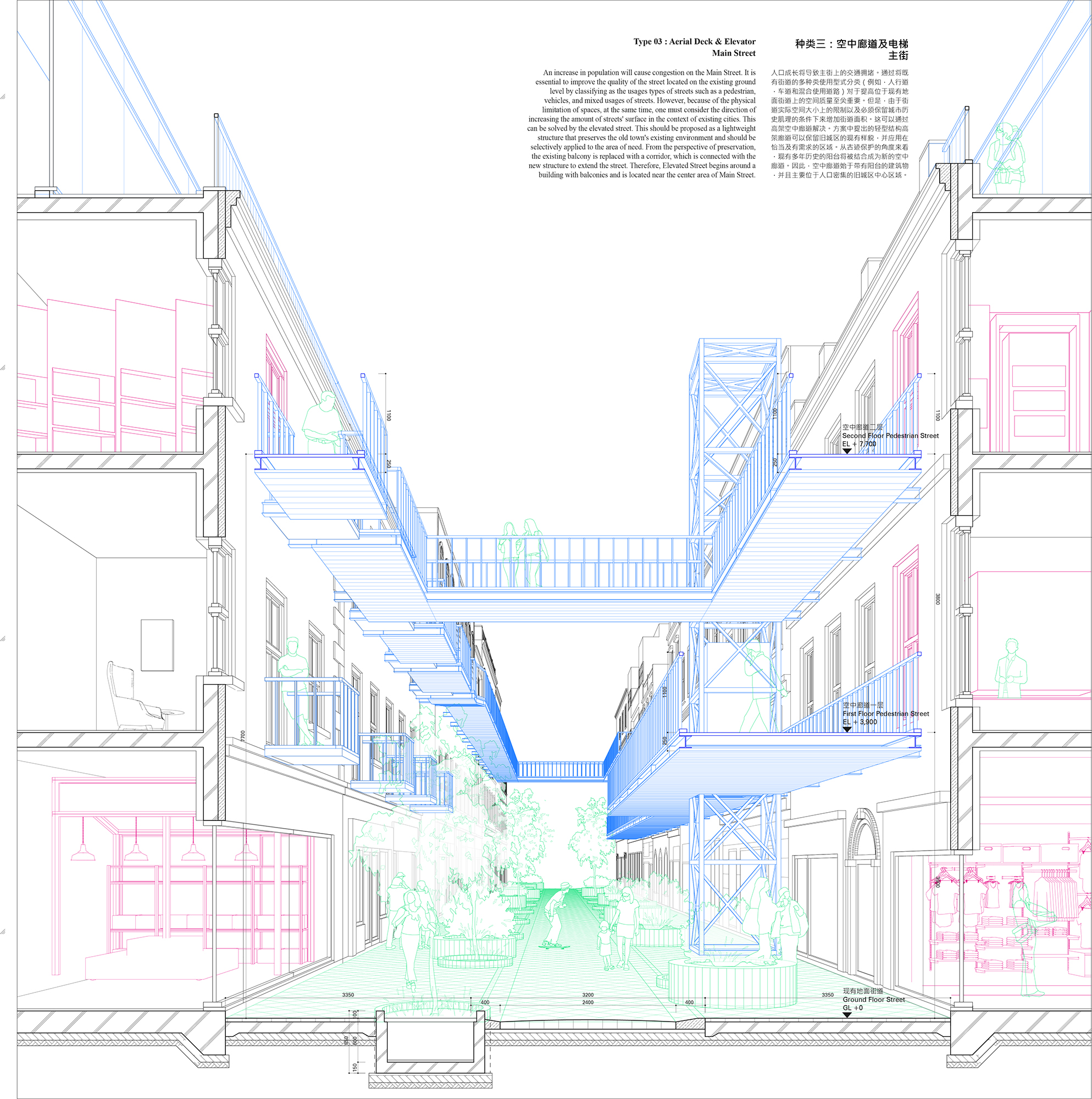 人口成长将导致主街上的交通拥堵。通过将既有街道的多种类使用型式分类（例如，人行道，车道和混合使用道路）对于提高位于现有地面街道上的空间质量至关重要。但是，由于街道实际空间大小上的限制以及必须保留城市历史肌理的条件下来增加街道面积。这可以通过高架空中廊道解决。方案中提出的轻型结构高架廊道可以保留旧城区的现有样貌，并应用在恰当及有需求的区域。从古迹保护的角度来看，现有多年历史的阳台将被结合成为新的空中廊道。因此，空中廊道始于带有阳台的建筑物，并且主要位于人口密集的旧城区中心区域。